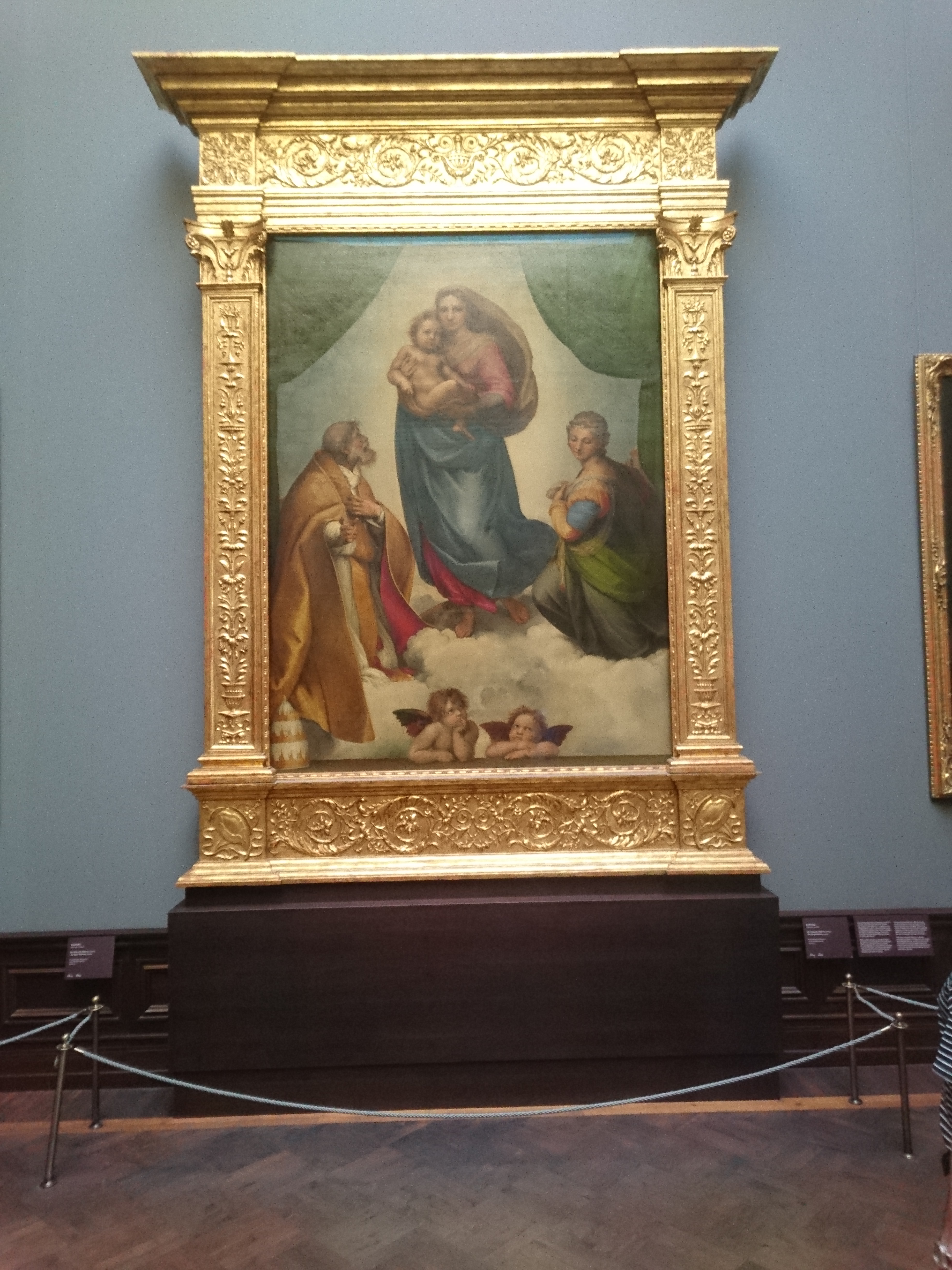 Սիքստինյան Տիրամայր